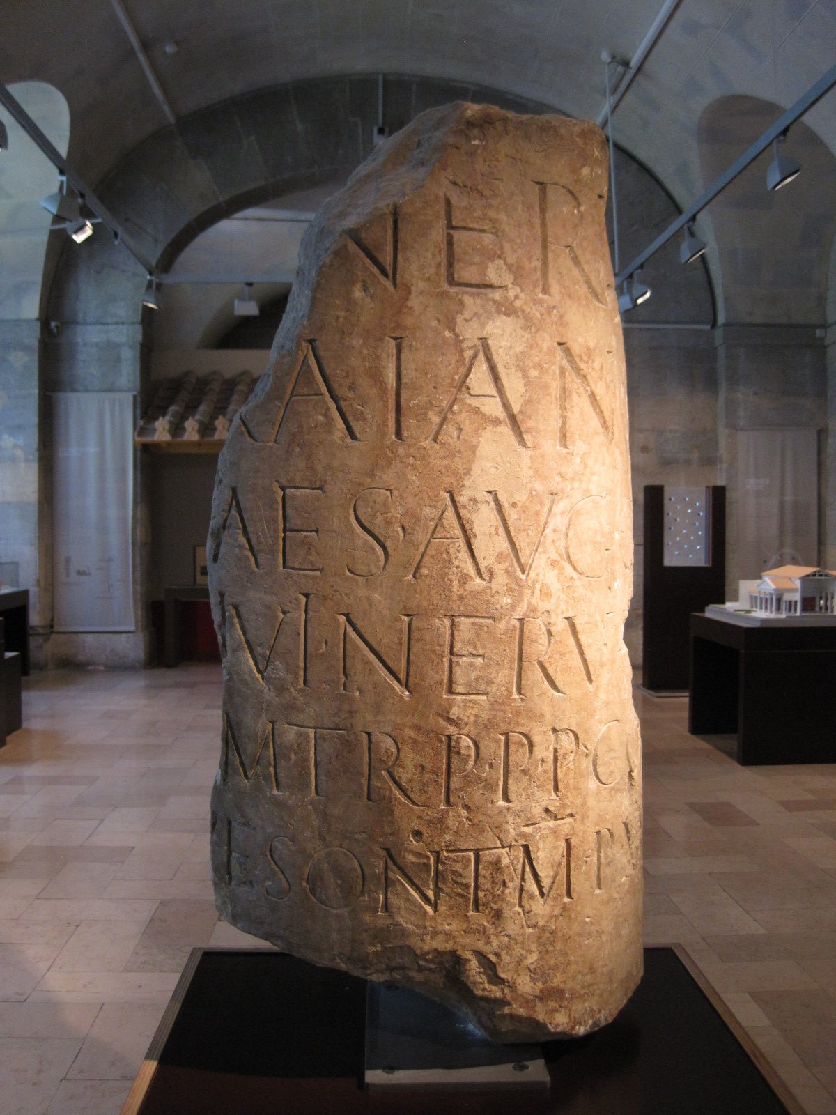 Fragment de borne milliaire avec mention de la distance à Vesontio - Sous l’empereur romain Trajan (98-117) - Mathay (Doubs) - Archéologie au Musée des Beaux-Arts de Besancon - reference épigraphique : CIL 17-02, 00485 alias CIL 13, 09079 (4, p 147) alias CAG-25/90, p 358 alias AE 1901, 00199